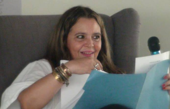 Inaugurando el Pabellón de Poesía de la Feria Internacional del Libro 2013 en Santo Domingo, República Dominicana